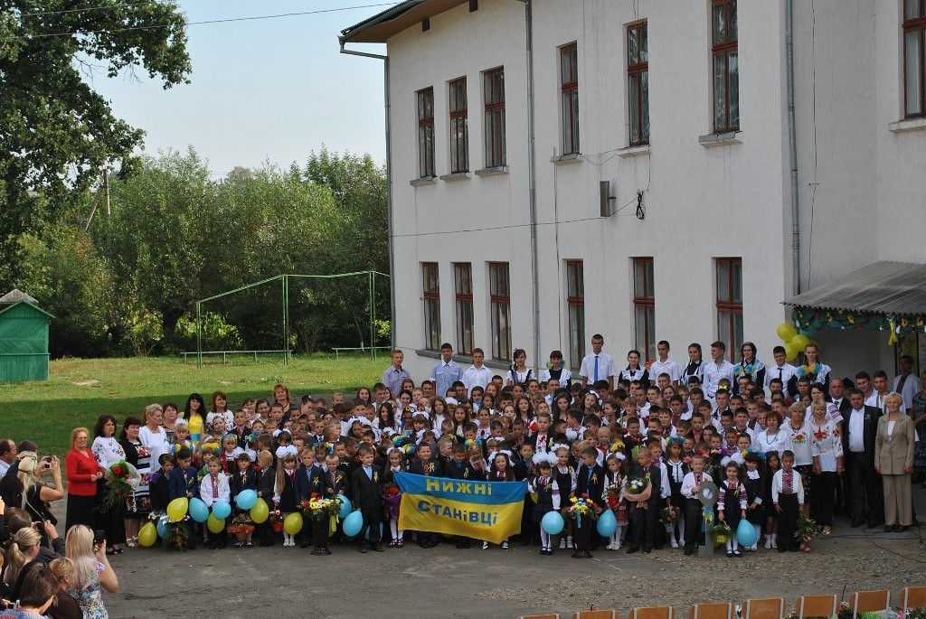 Весь шкільний колектив